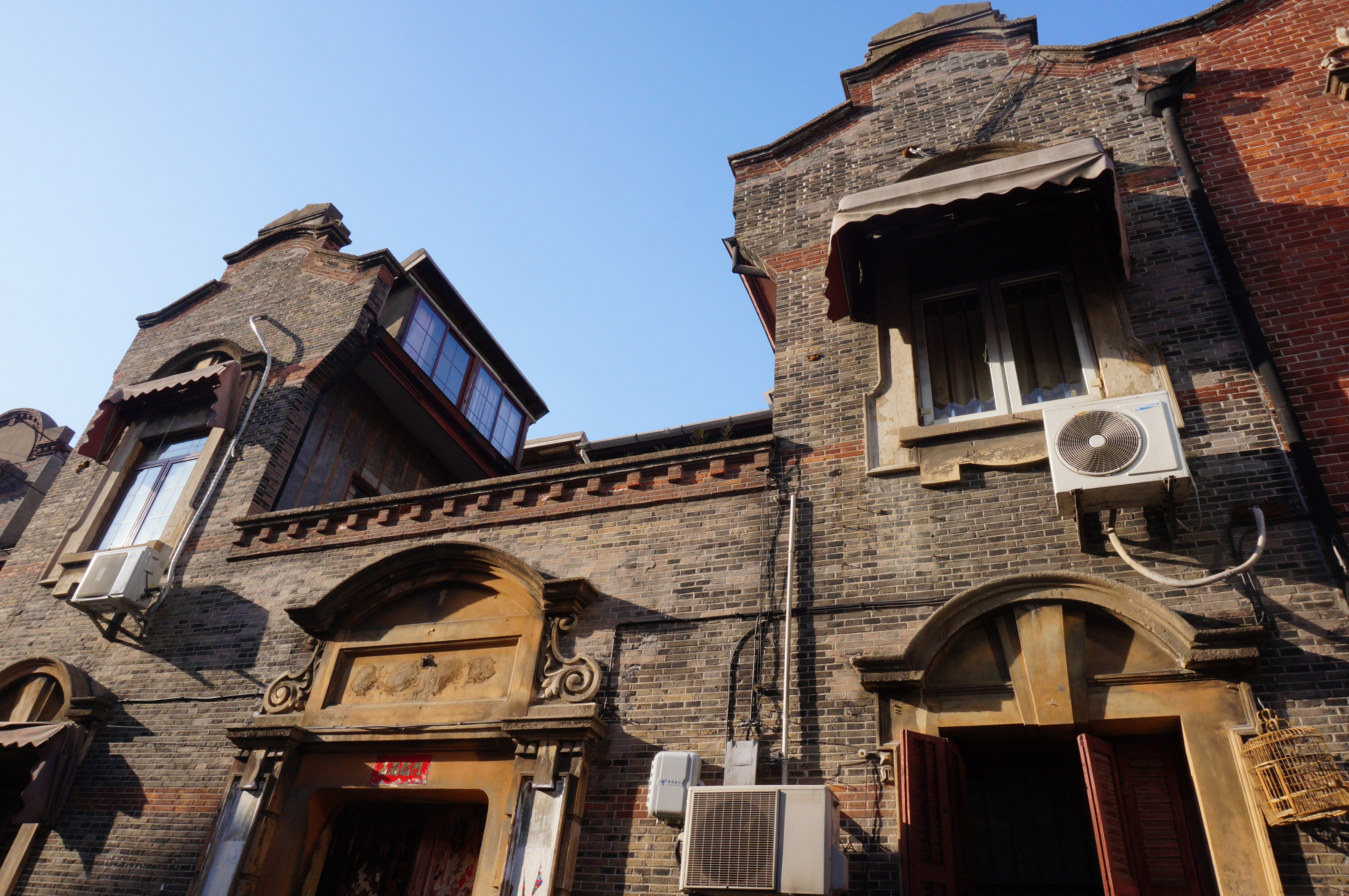 中文（中国大陆）: 张园内的石库门房屋的墙式样